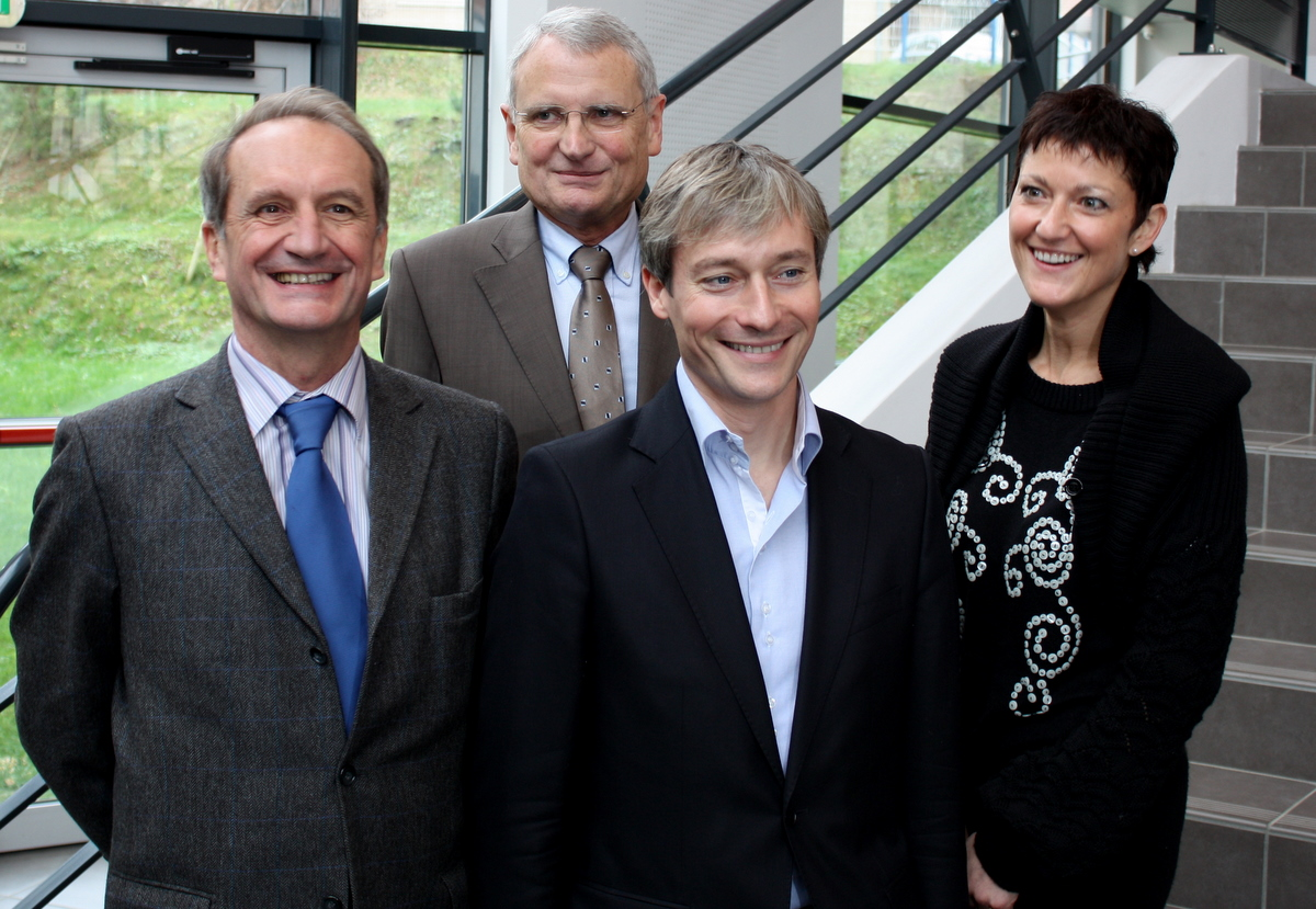 Laurent Hénart, tête de liste UMP en Lorraine pour les régionales de 2010, entouré d'Anne Grommerch-Brandenbourger (à droite), de Gérard Longuet (à gauche) et de Gérard Cherpion (derrière).